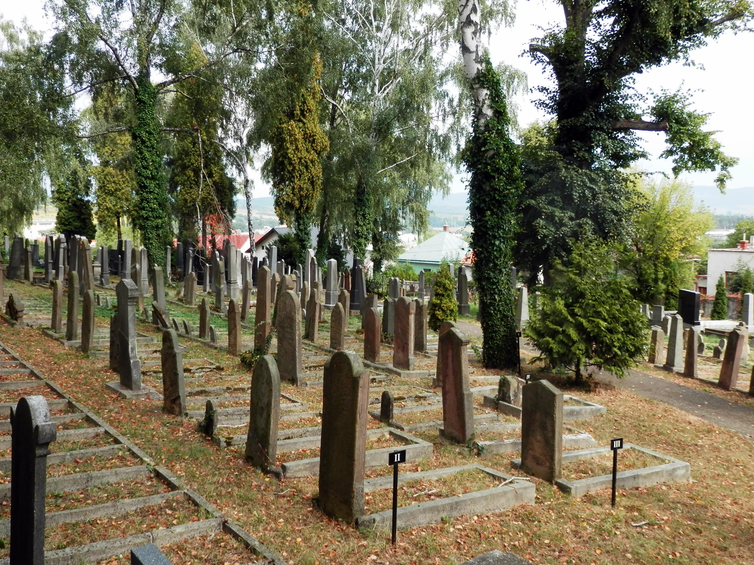 Cintorín židovský - neologický; Beth Olam s asi 750 náhrobnými pomníkmi. Ulica Krátka, mesto Prešov.